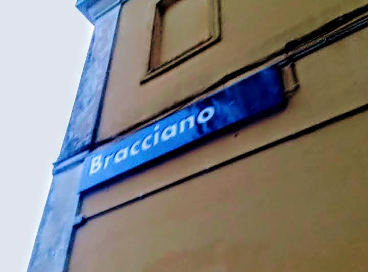 opera propia